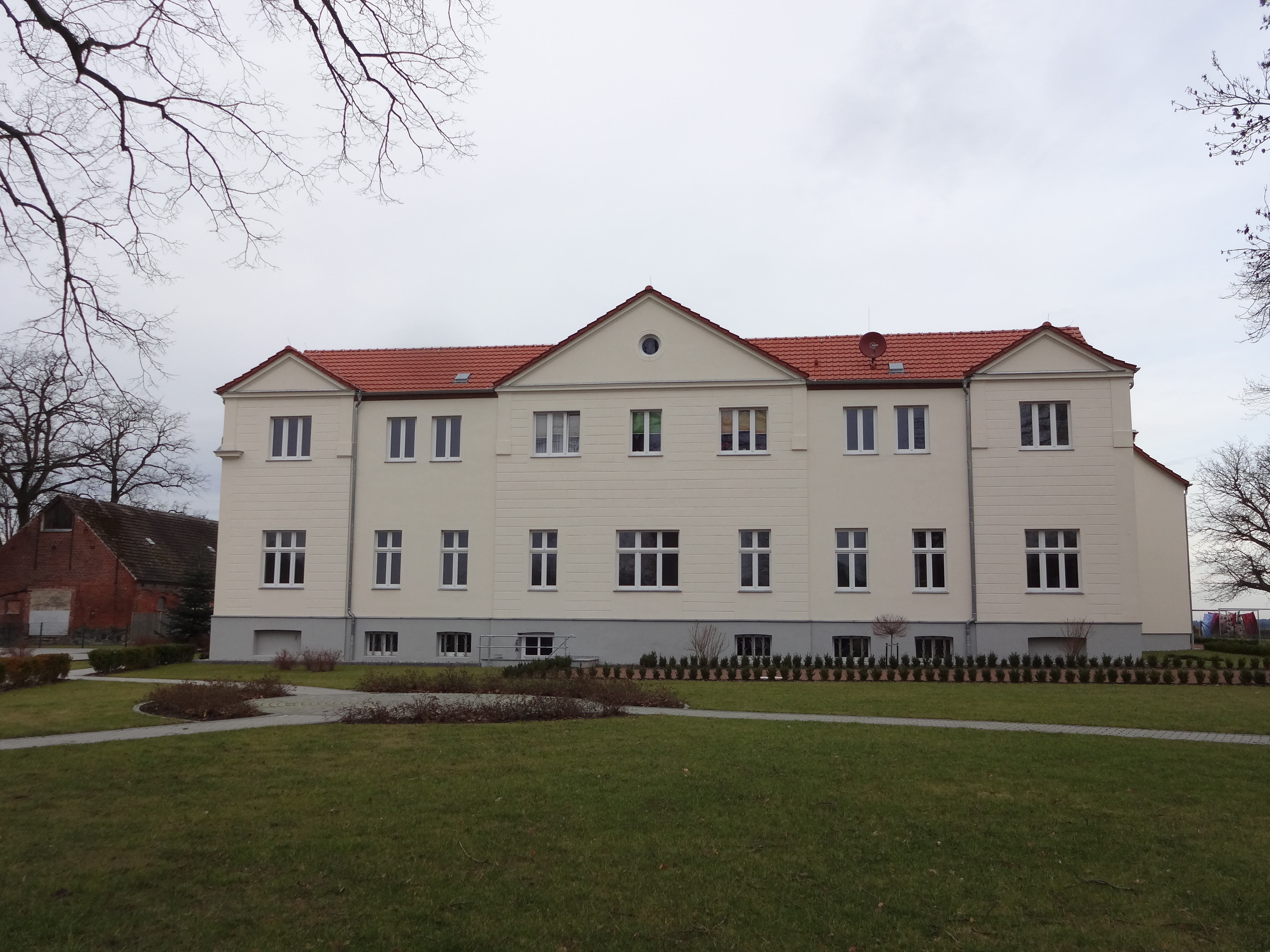 Ehemaliges Gutshaus in Stechow